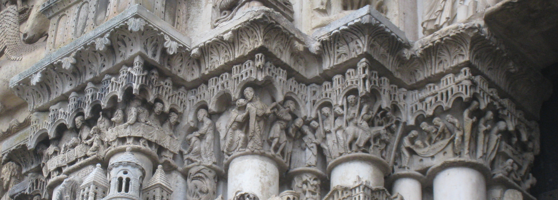 Épisodes de la vie du Christ dans la frise ornant les chapiteaux du portail royal de la Cathédrale de Chartres (baie de droite, ébrasement de gauche).